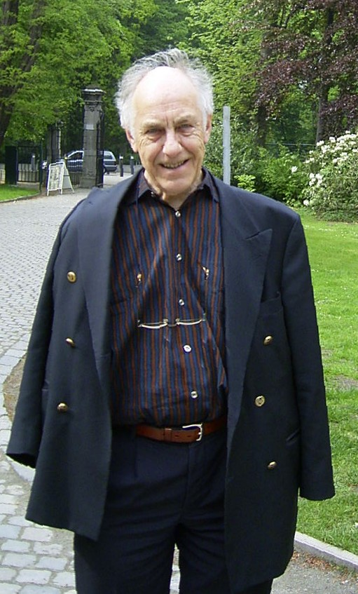 Letterkundige M.C.A. van der Heijden. Opname ter beschikking gesteld door de geportretteerde.